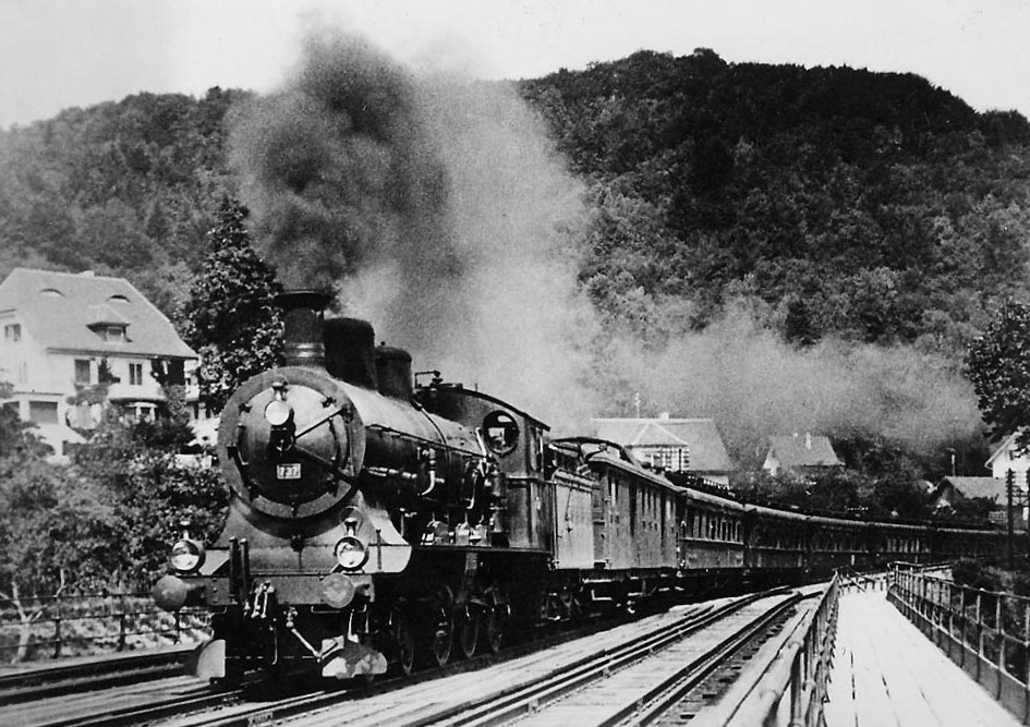 Train de luxe militaire bei Wettingen mit Lokomotive A 3/5 737 der Schweizerischen Bundesbahnen, gebaut 1906 inn der Schweizerische Lokomotiv- und Maschinenfabrik in Winterthur, zwischen 1927 und 1953 außer Dienst gestellt und anschließend abgebrochen. Der Zug verkehrte nur in den Jahre 1919 und 1920.